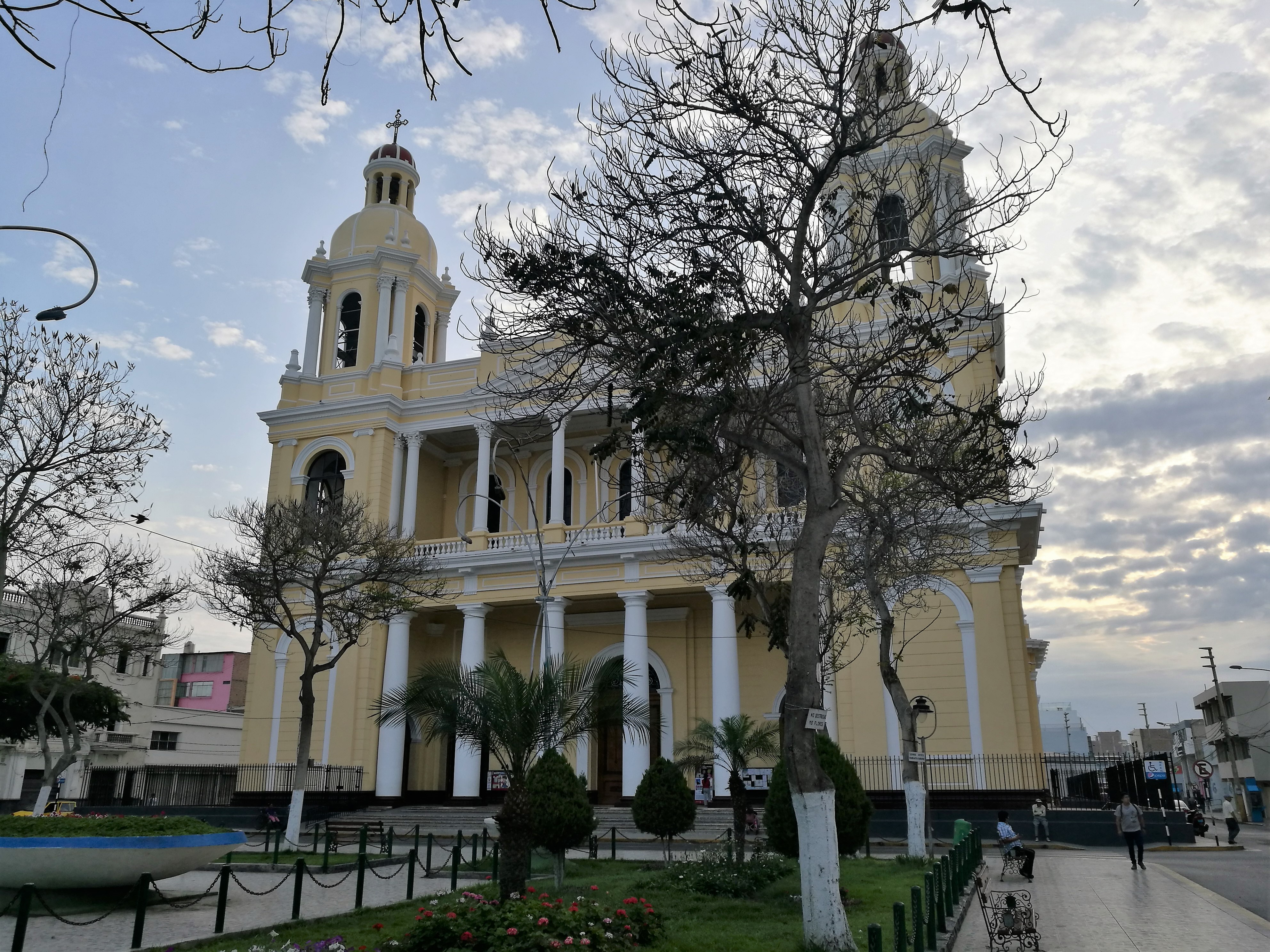 Catedral de Chiclayo des de la Plaza de Armas